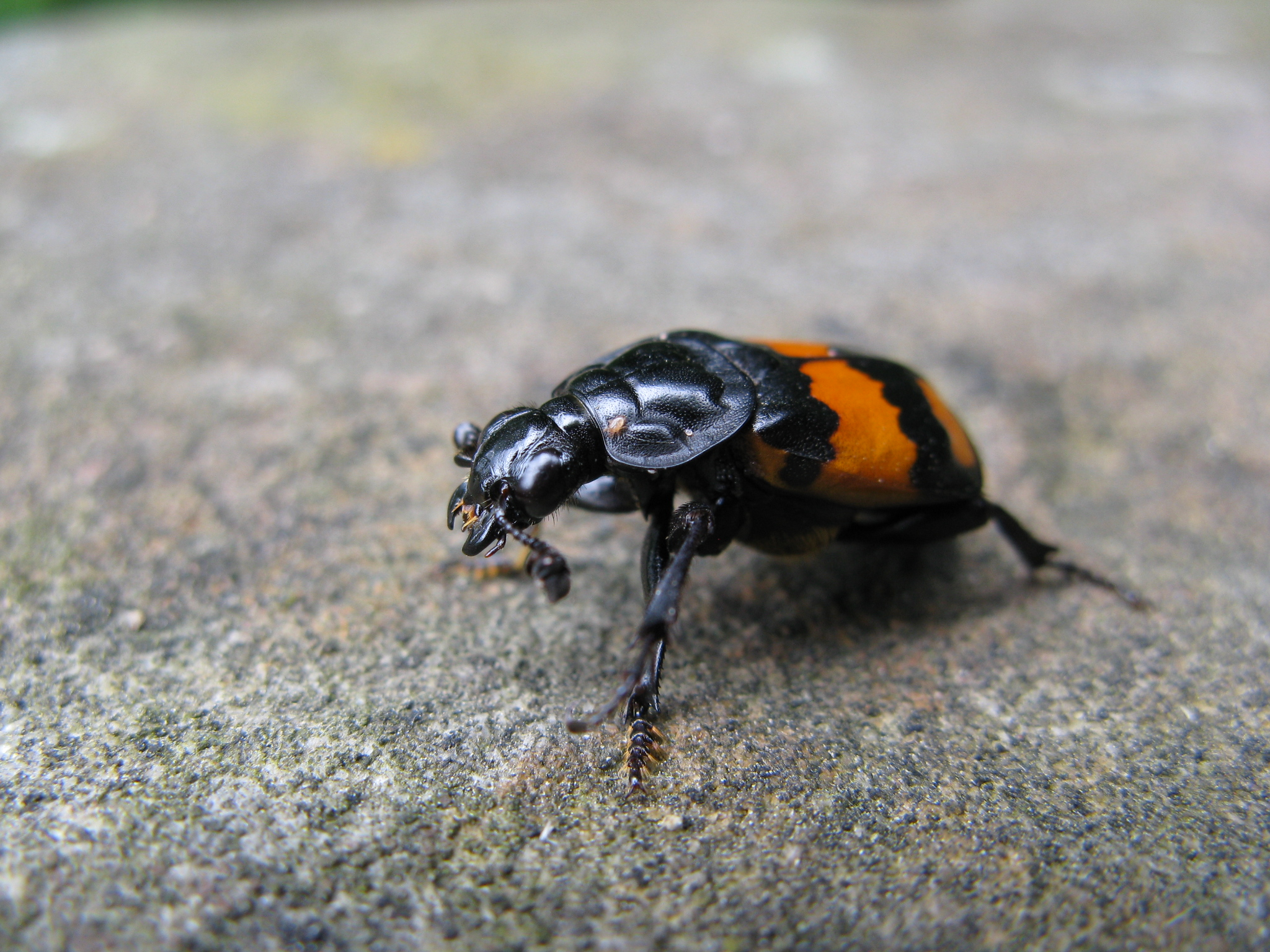 Hrobařík malý